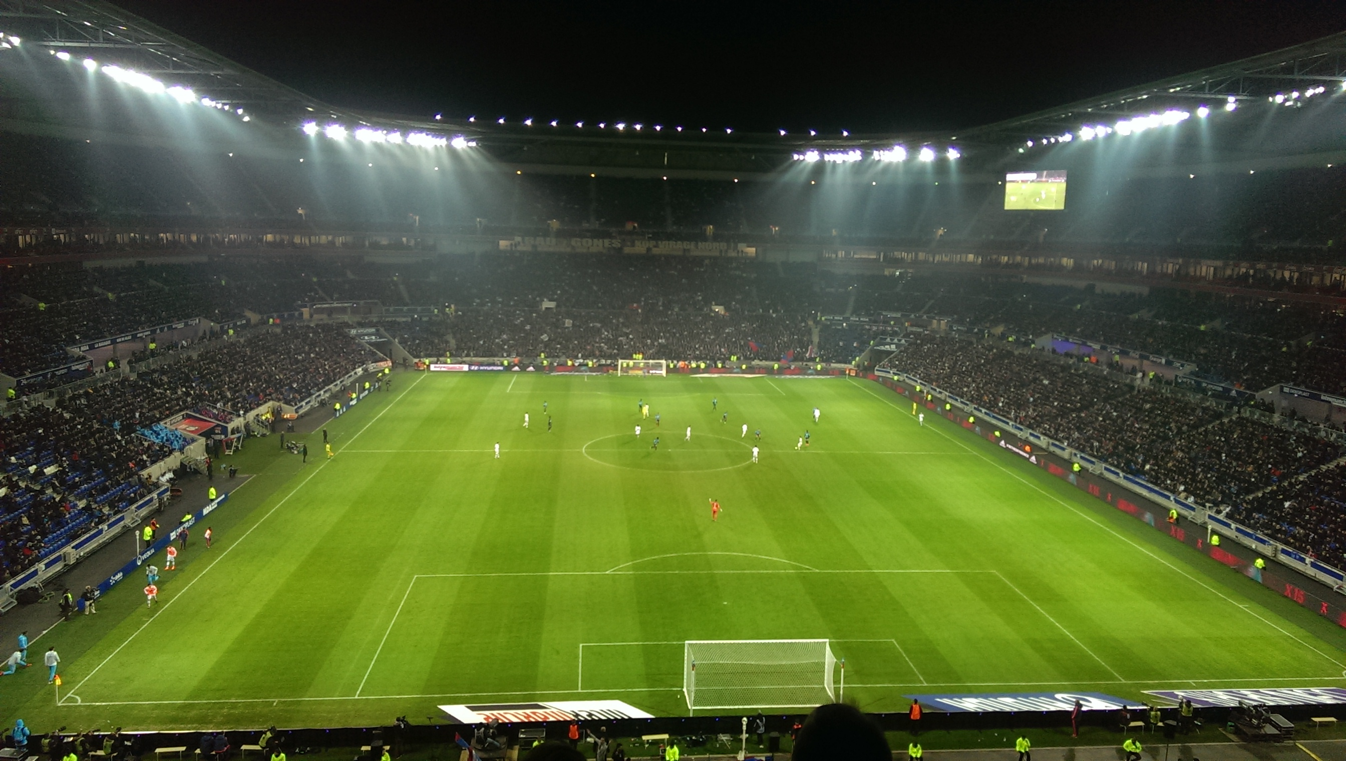 Stade des Lumières, le 24 janvier 2016 lors du match Olympique Lyonnais - Olympique de Marseille